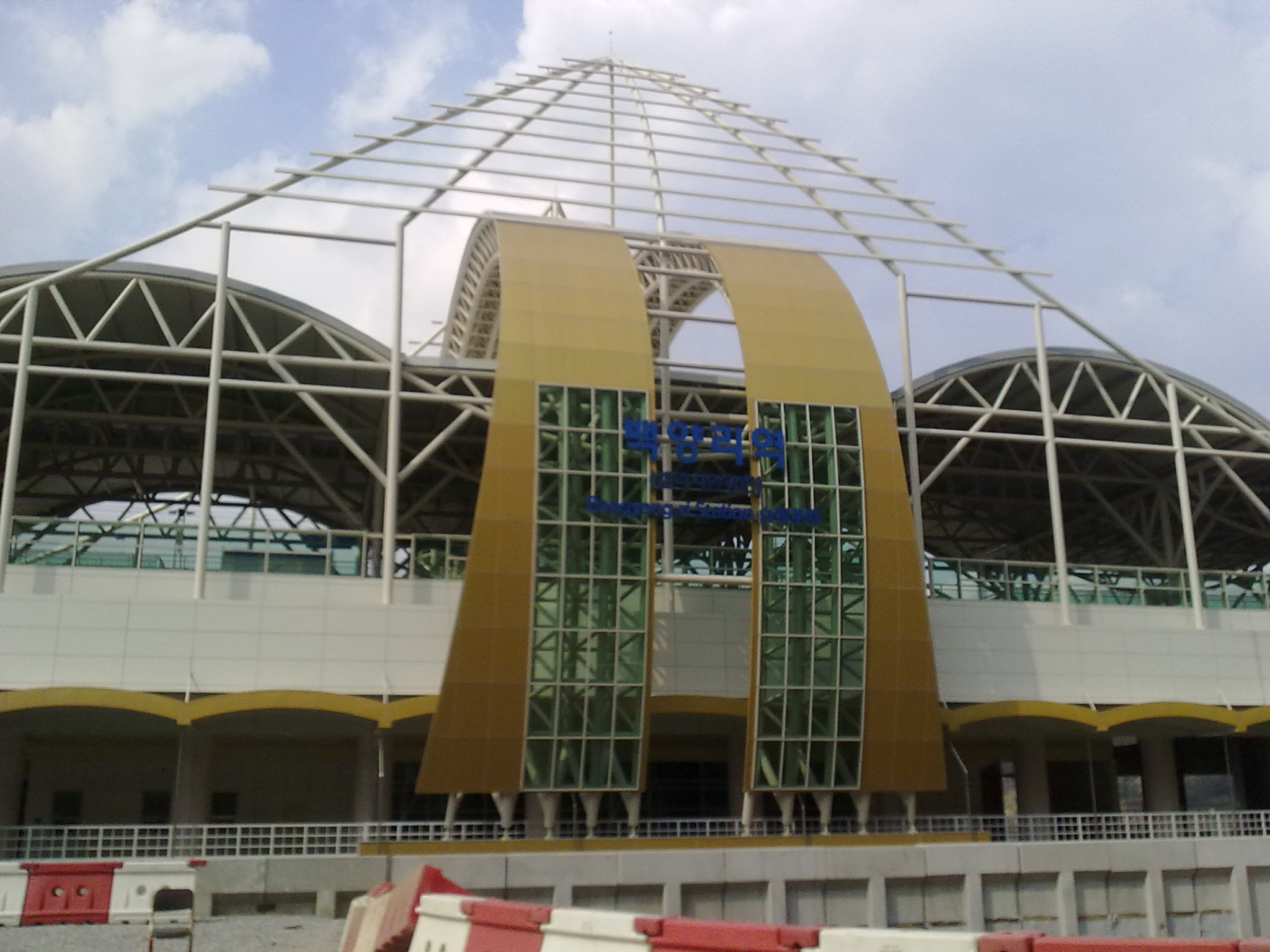 백양리역 건물